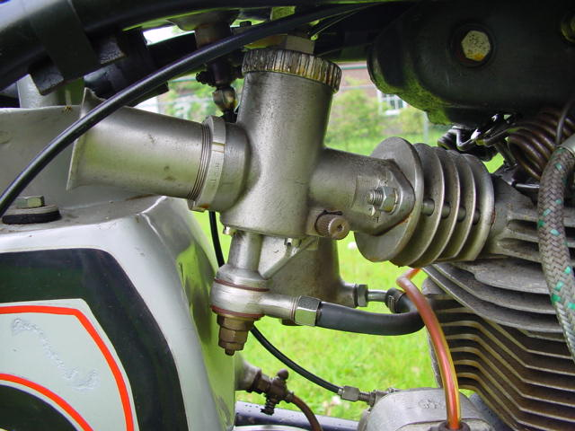 Vecchio carburatore motociclistico.